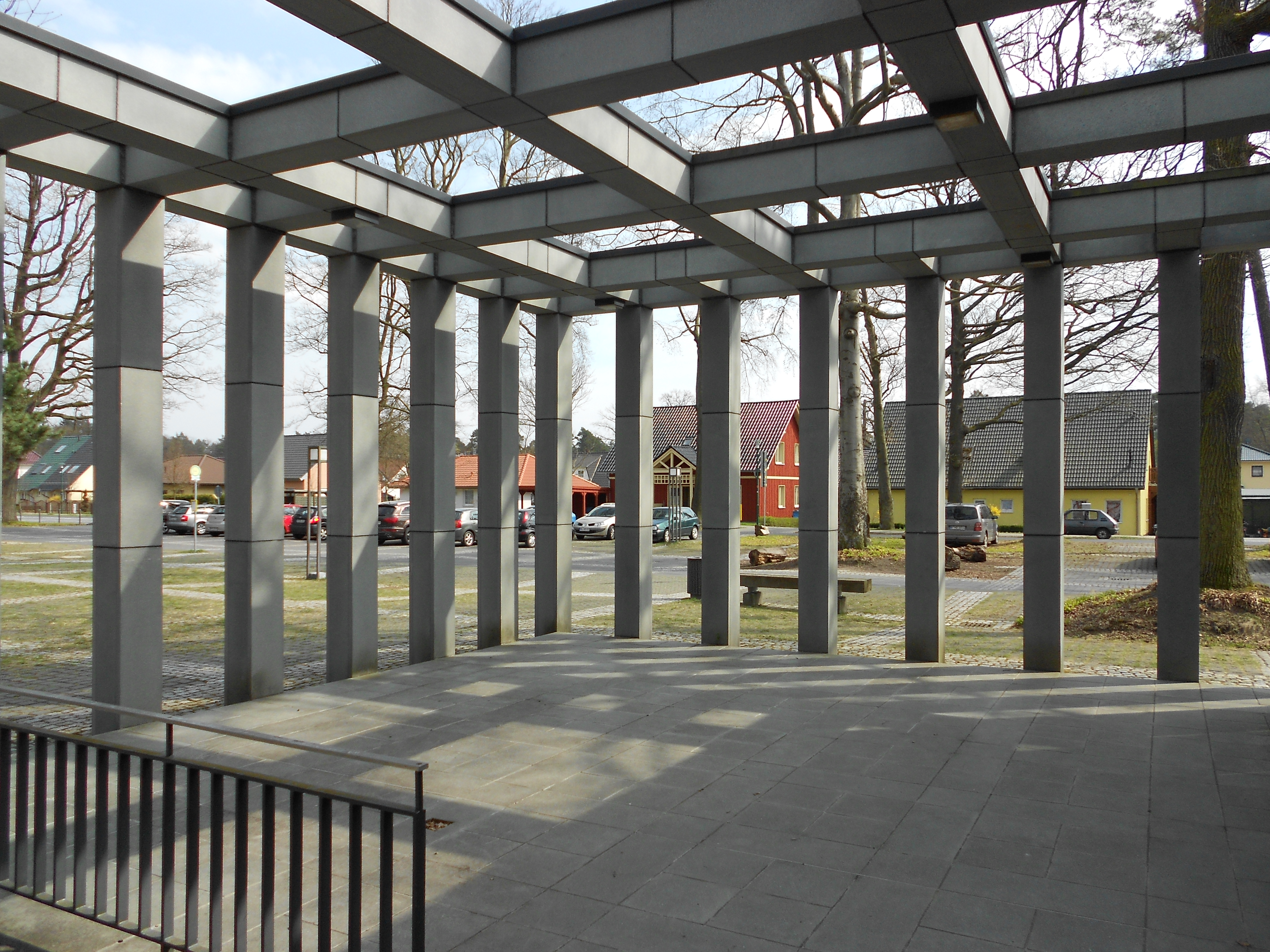 Eberswalde Südend, ehemalige Artilleriekaserne (bis 1945), sowjetische Kaserne (bis 1994), heute Landeskriminalamt, Finanzamt und andere Behörden